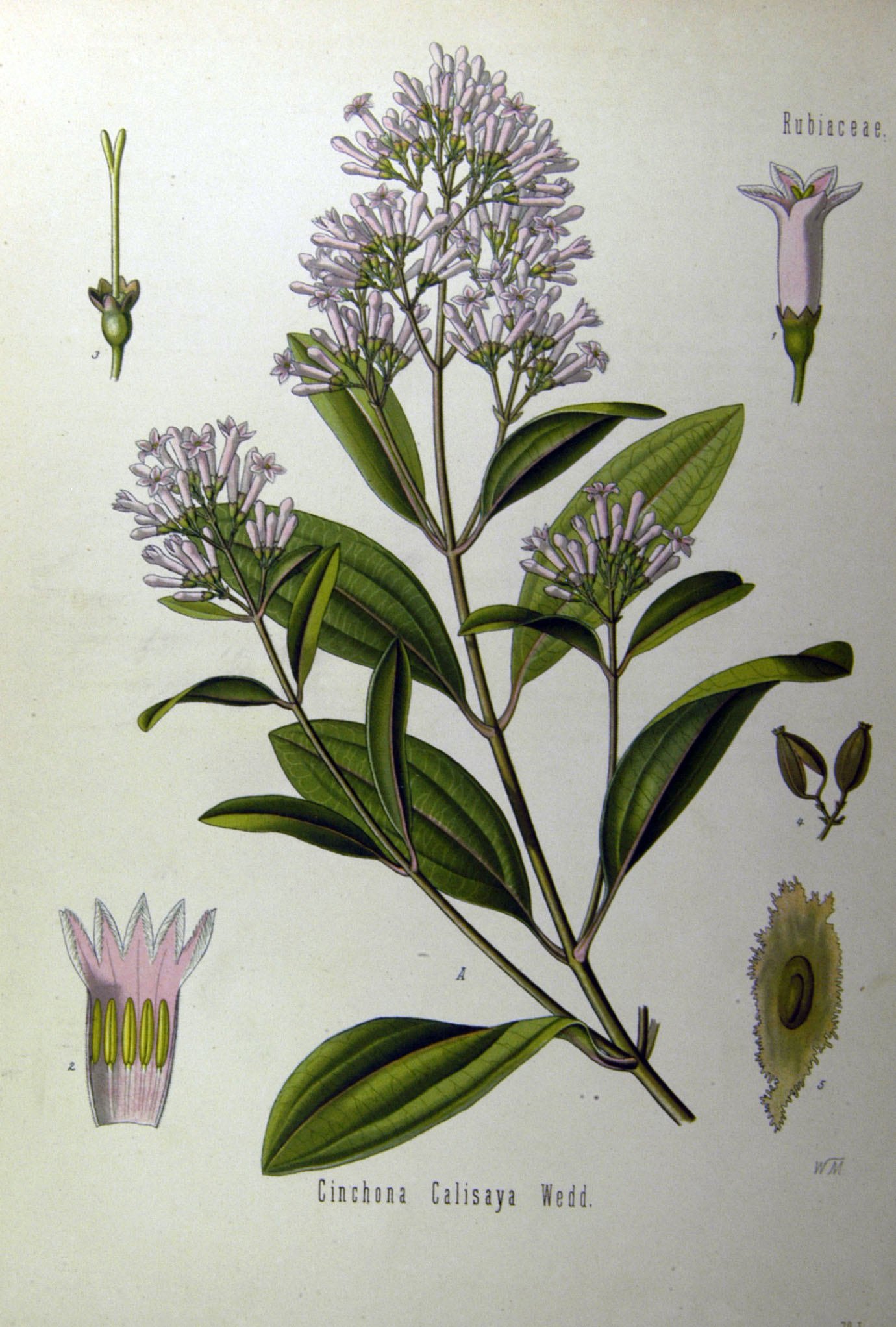 Planche botanique n° I-79 I de l'"Atlas des Plantes médicinales de Köhler en images réalistes avec brèves notes explicatives" consacrée au quinquina jaune.